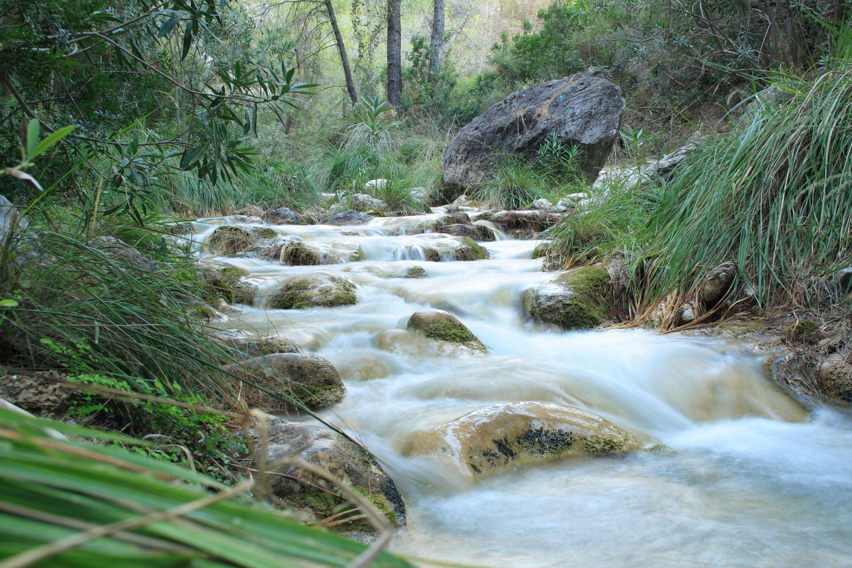 River Chillar, Málaga, Andalucia, Spain Río Chillar, Málaga, Andalucia, España